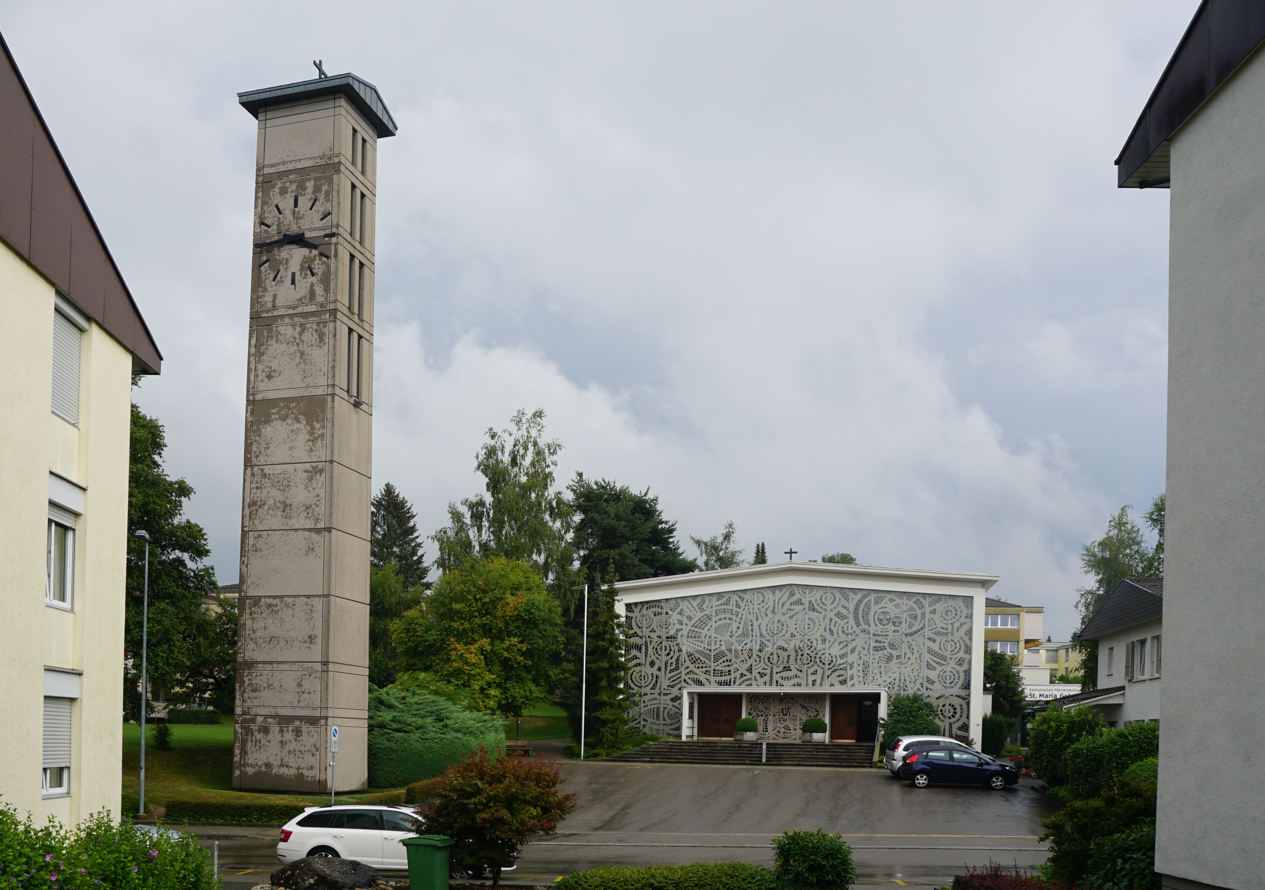 Kirche Maria Geburt, Lyss. Turm mit Vorplatz und Kirchenfassade